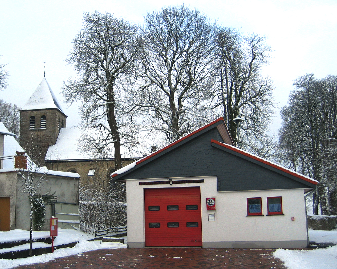 Das 1975 eingeweihte Feuerwehrgerätehaus der Freiwilligen Feuerwehr Bad Driburg Löschgruppe Pömbsen an der Kreuzstraße in Pömbsen, Bad Driburg, Deutschland. Links im Hintergrund die Mariä-Himmelfahrt-Kirche.